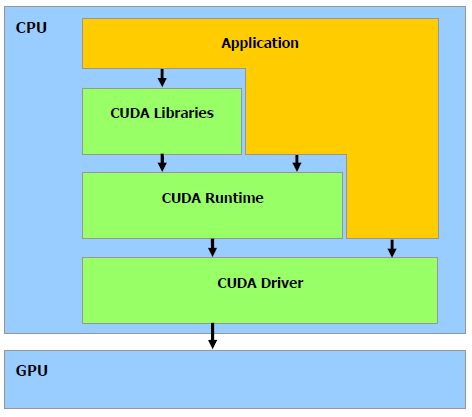 bendrosios paskirties lygiagrečiųjų skaičiavimų architektūros programinės įrangos architektūra